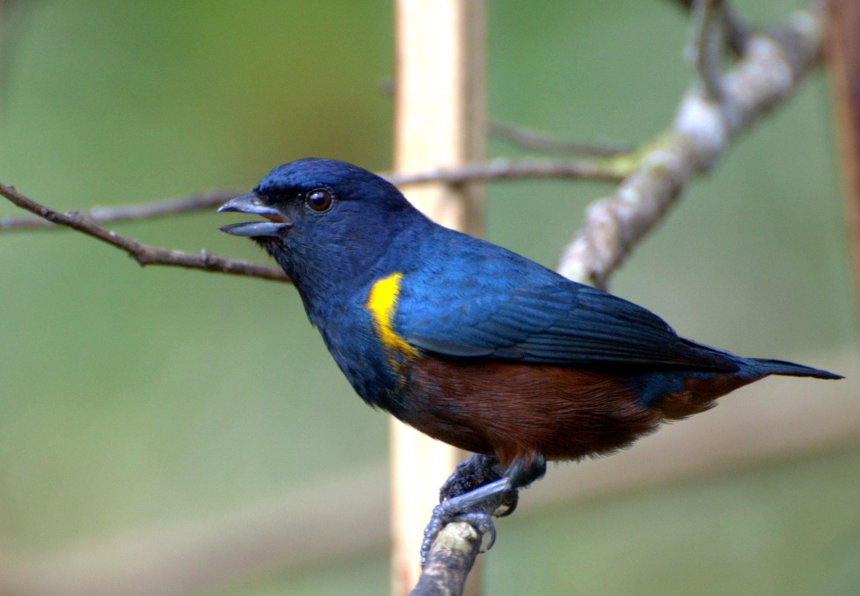 Folha Seca - Ubatuba-SP -Brasil